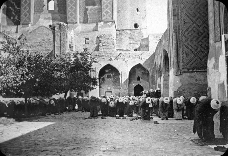 Из Стамбула в Ташкент: Фотопленки Поля Надара (1890). Часть 12. Самарканд